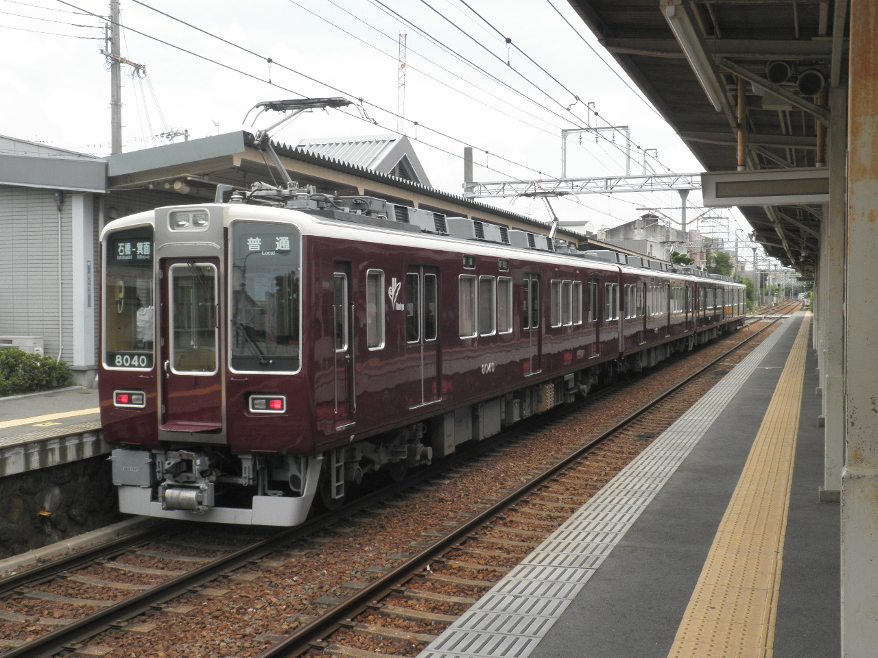 箕面線に入った8040形